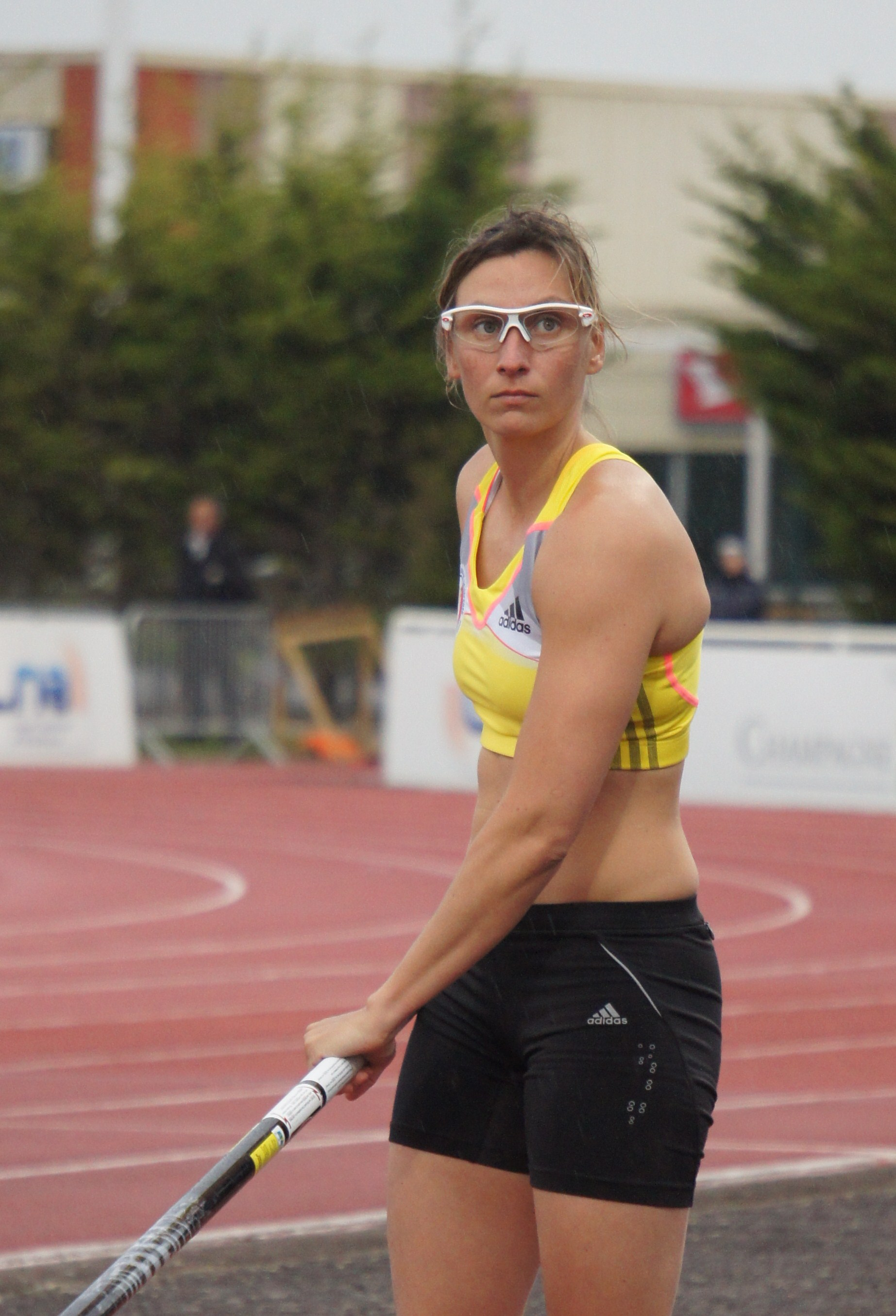 Vanessa Boslak lors des Rencontres d'athlétisme de Reims 2013 .